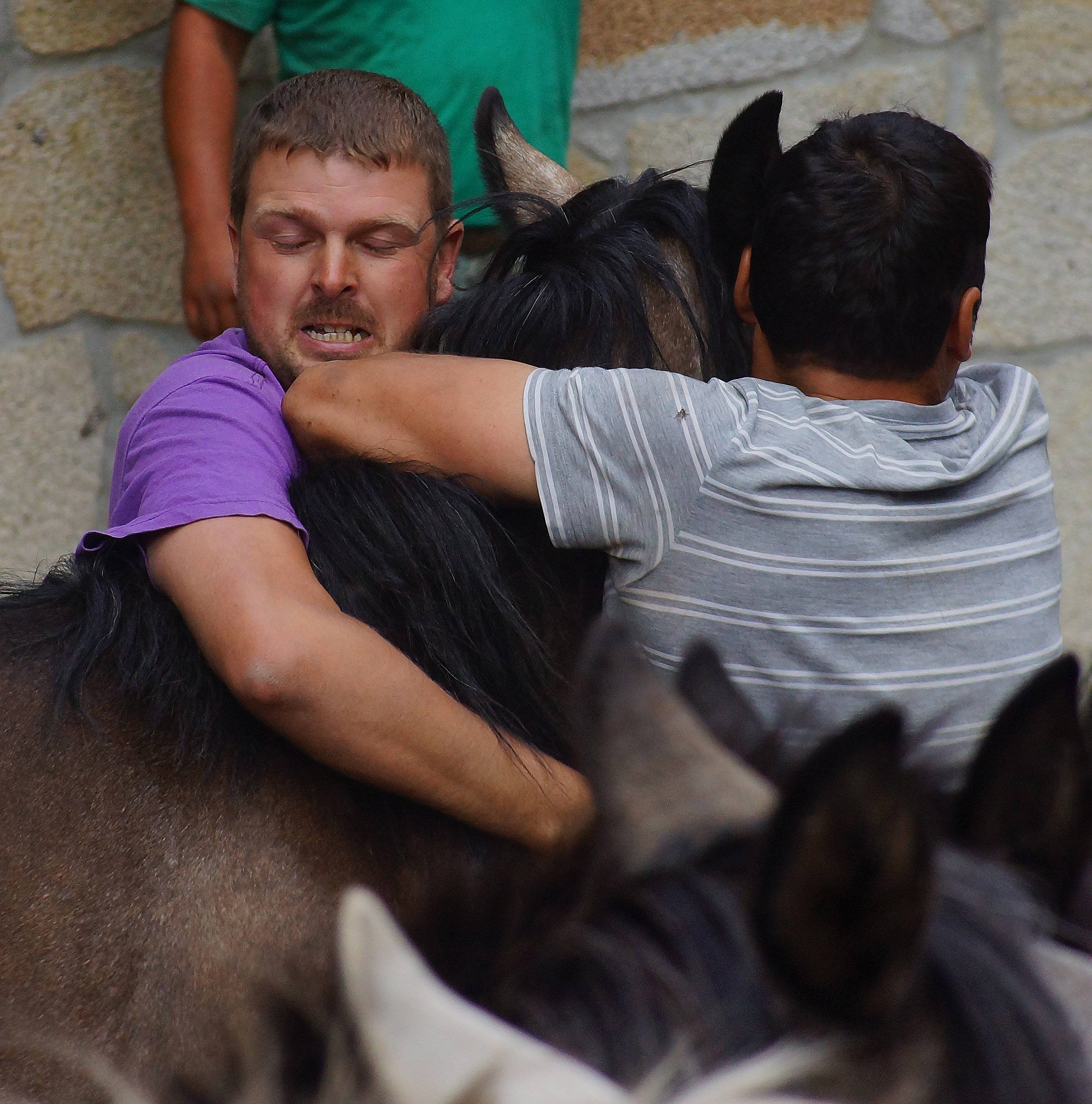 Cotobade, Pontevedra, Galicia, España, Spain